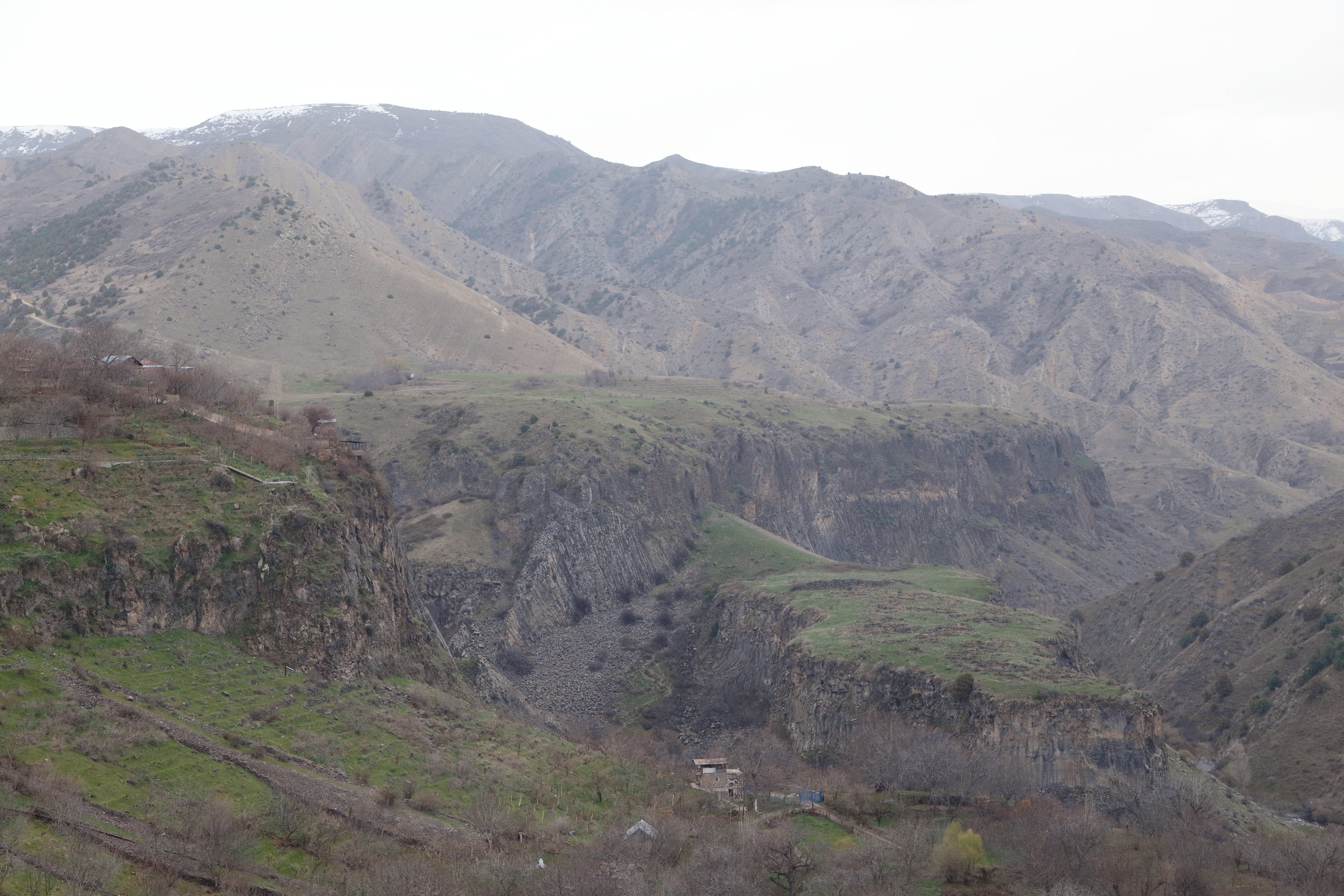 Гарни, Армения